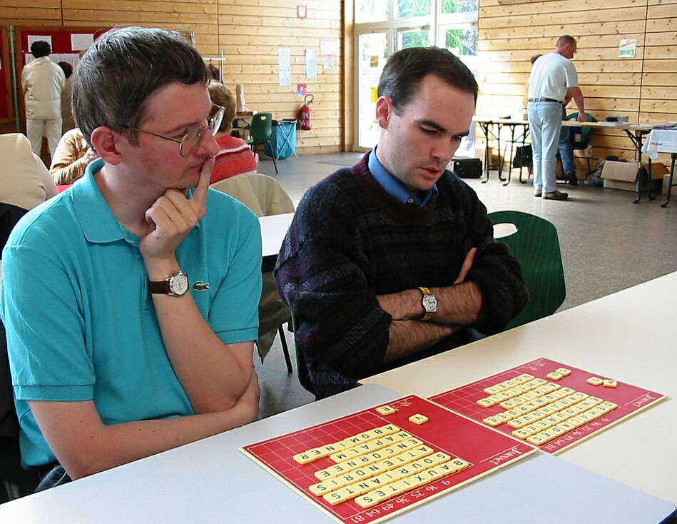 Partie de Jarnac Deux scrabbleurs émérites s'affrontent au Jarnac : Pascal Fritsch et Antonin Michel. Photographie personnelle prise le 9 juillet 2004 à La Bresse. Copyright : Christian Amet. Catégorie:Photo de jeu de société